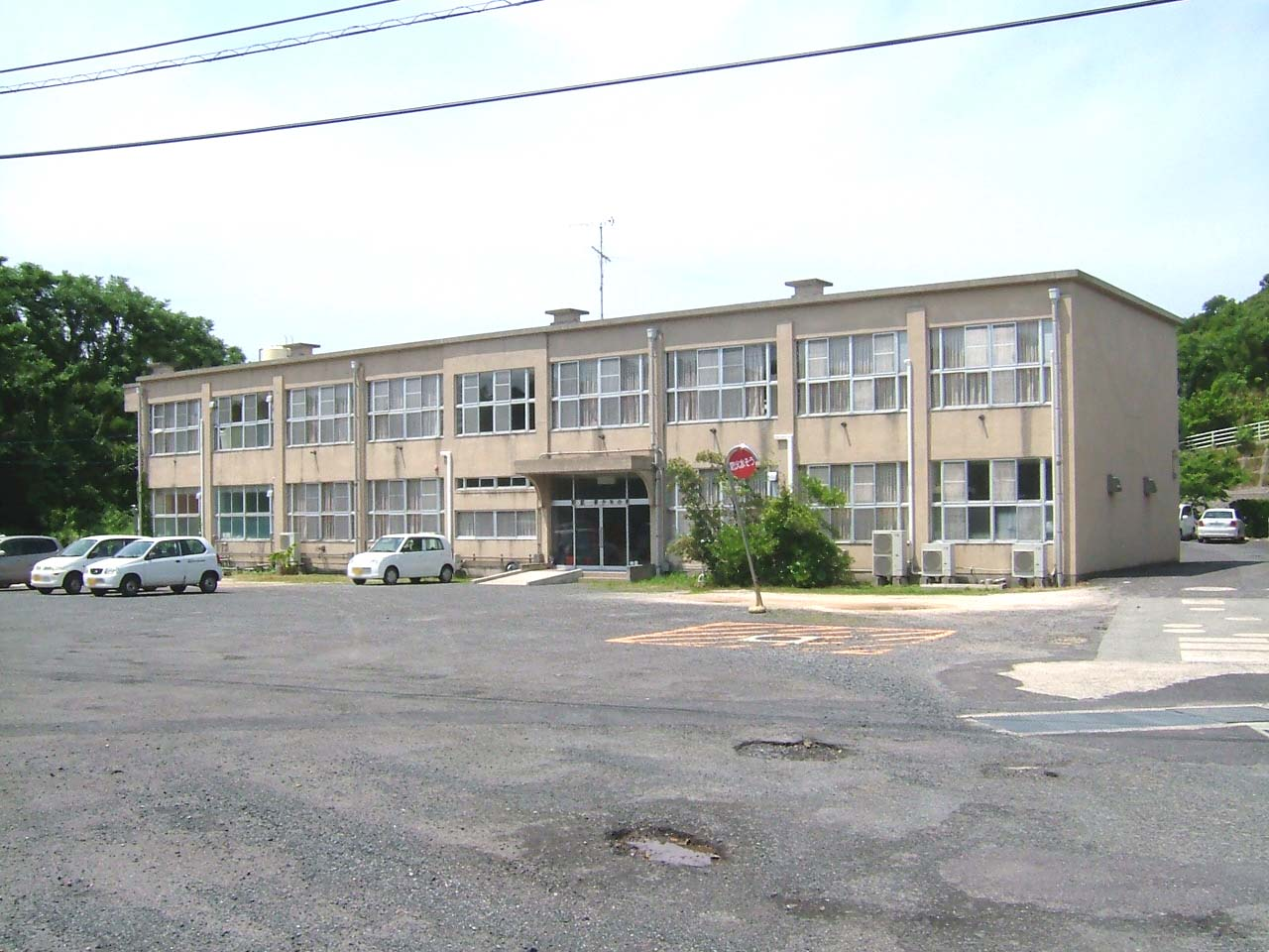 泊村立泊小学校旧校舎